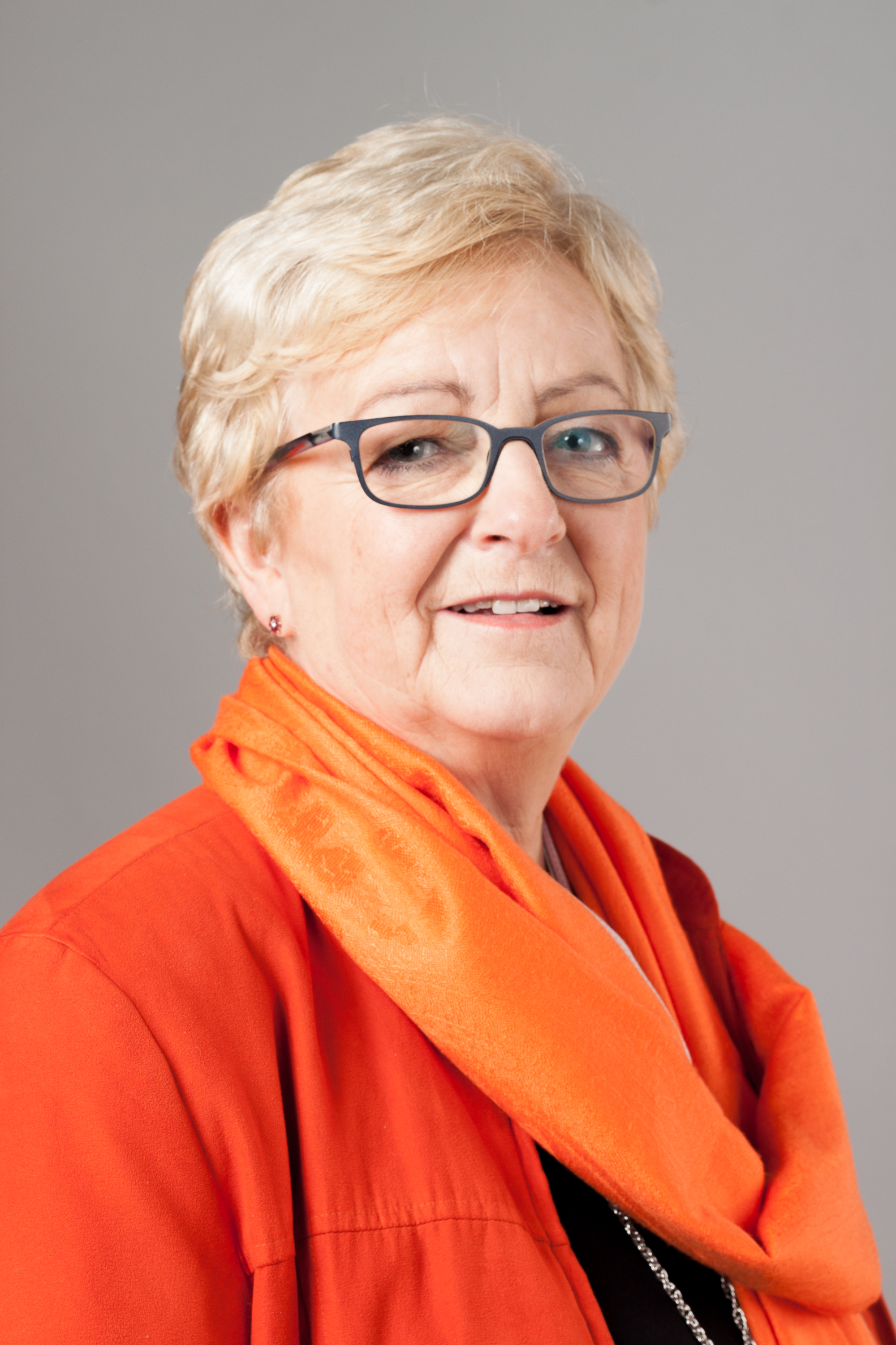 Landtagsabgeordnete NRW Inge Howe